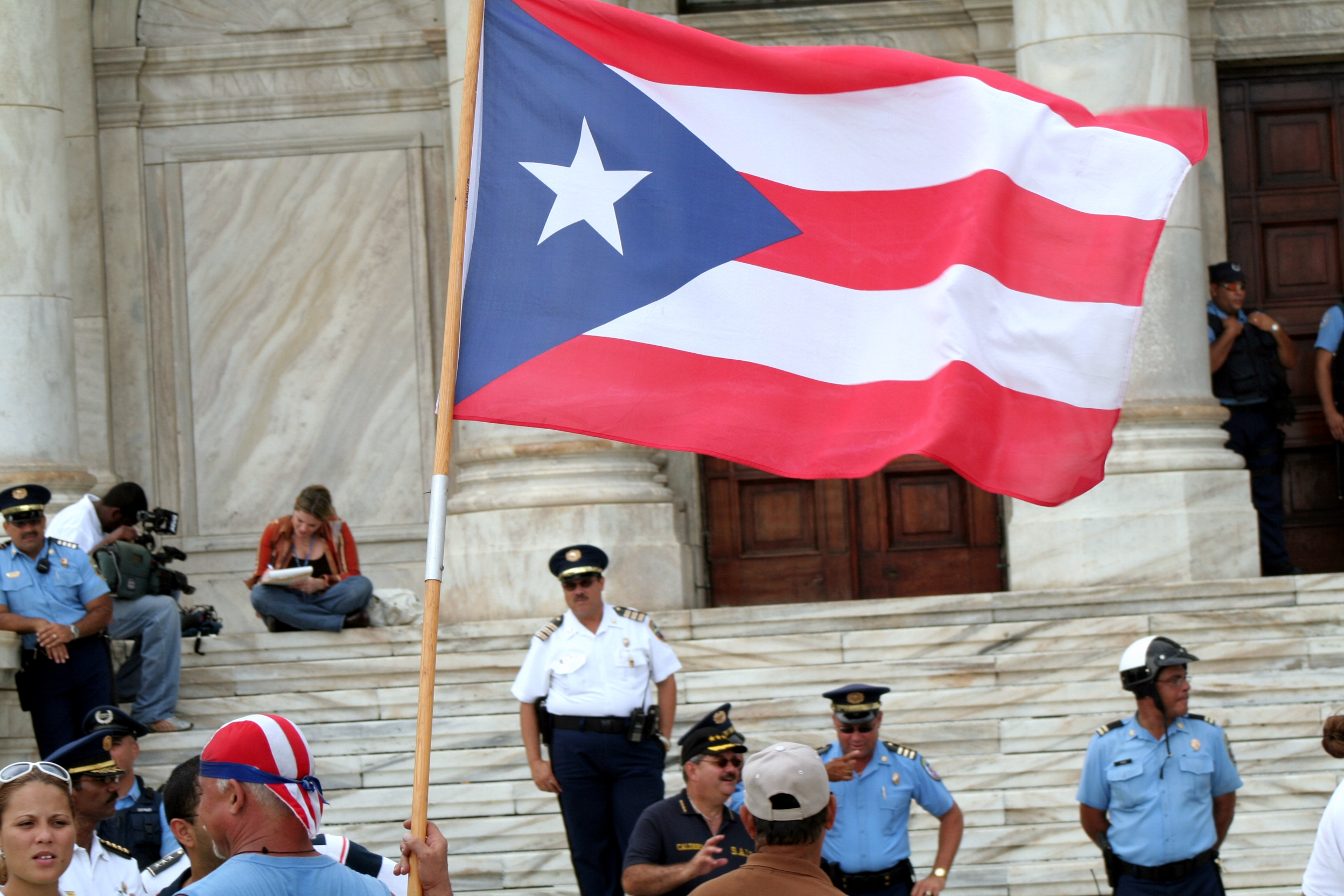 el simbolo